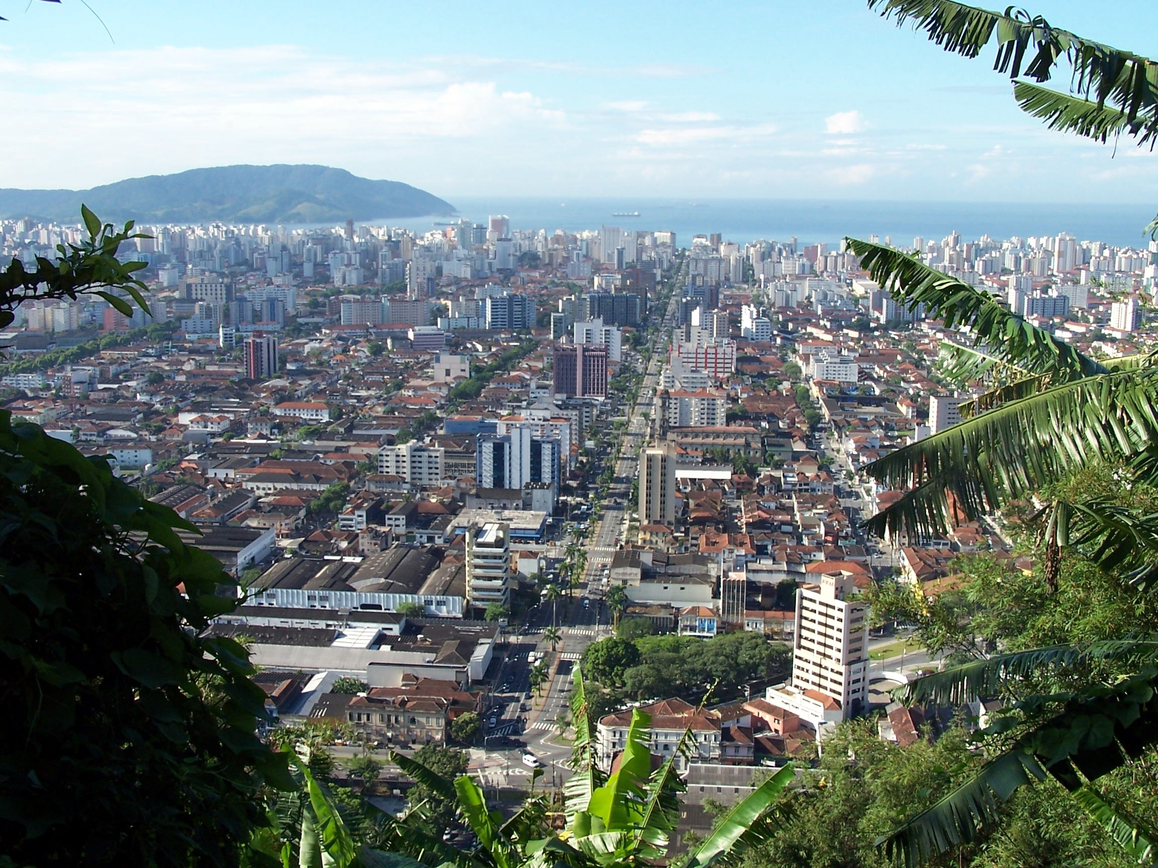 Monte Serrat - Santos - SP - Brasil. Vista da cidade de Santos e entrada do porto. Foto de Paulo Carmona Sanches Neto - 2005